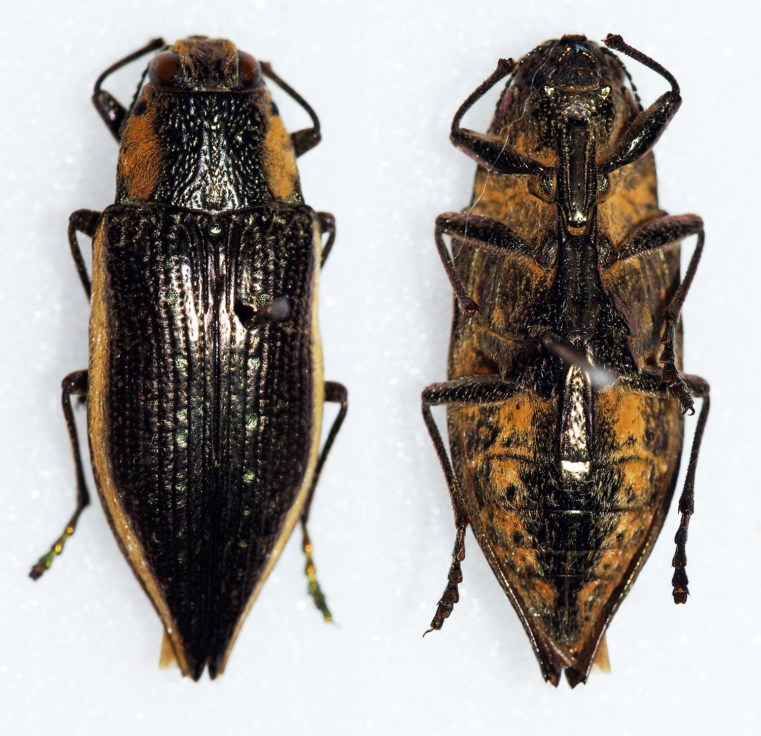 Buprestidae- In collection